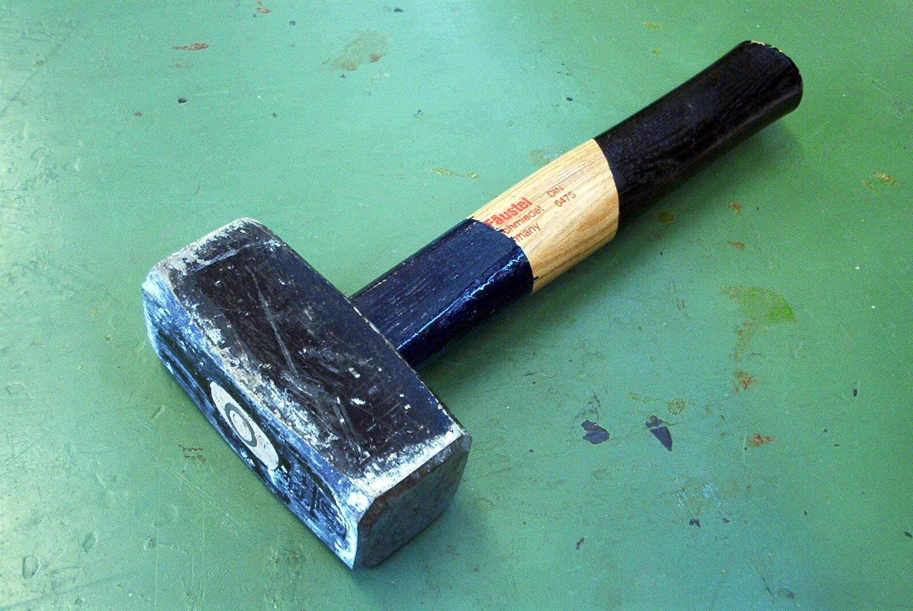 zelf gemaakte foto voor het publiek domein. Martink